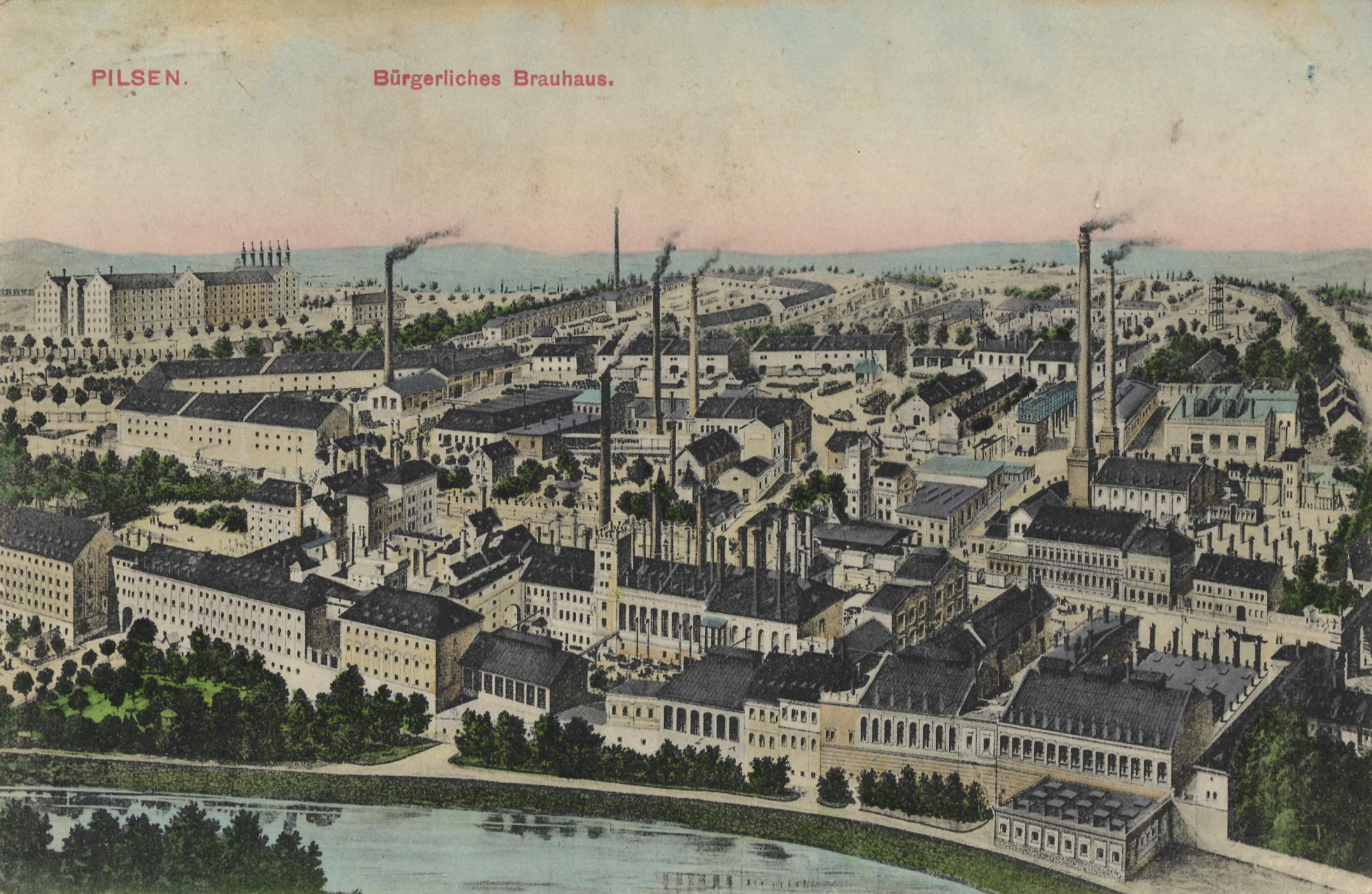 Bürgerliches Brauhaus